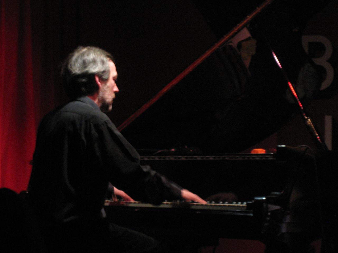 Ignasi Terraza, No me podía acordar el nombre de esta pianista y es uno de los mejores que he visto!!! Es un hombre que está casi totalmente ciego, pero esto no tiene importancia, sus manos se mueven a una velocidad que ni uno las puede ver, por lo que sería imposible de que pudiendo ver tocase mejor. Al final me acordé, se llama Ignasi Terraza.